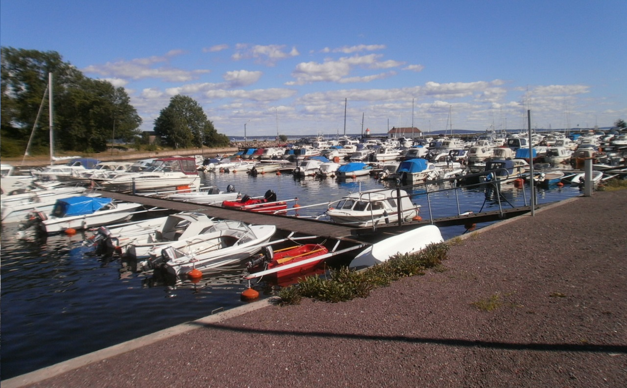 Småbåthavna i Fyllinga, Horten, ved utløpet av Horten kanal.